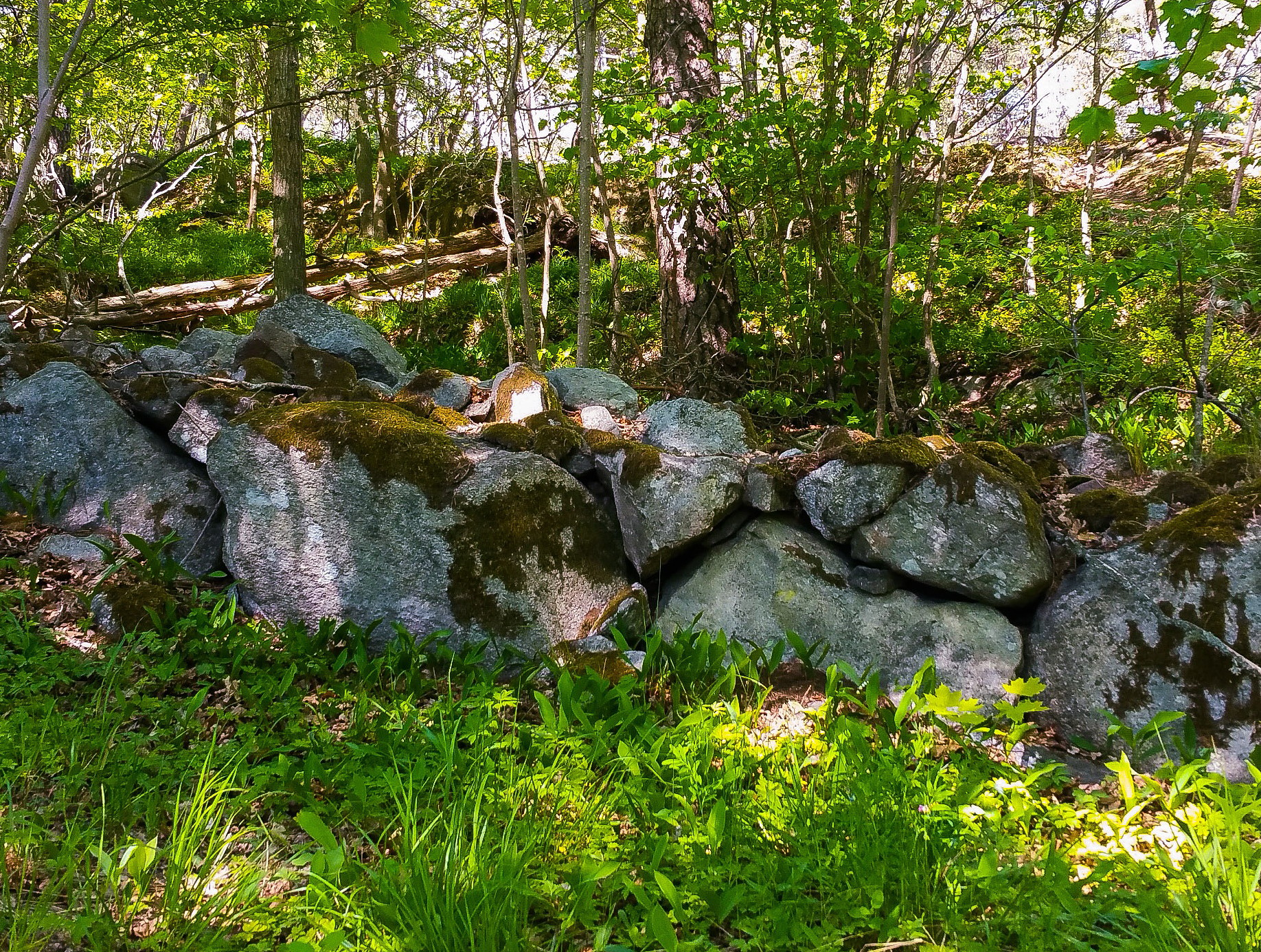 Murrester från gården Fredriksberg på Kvarnholmen i Nacka